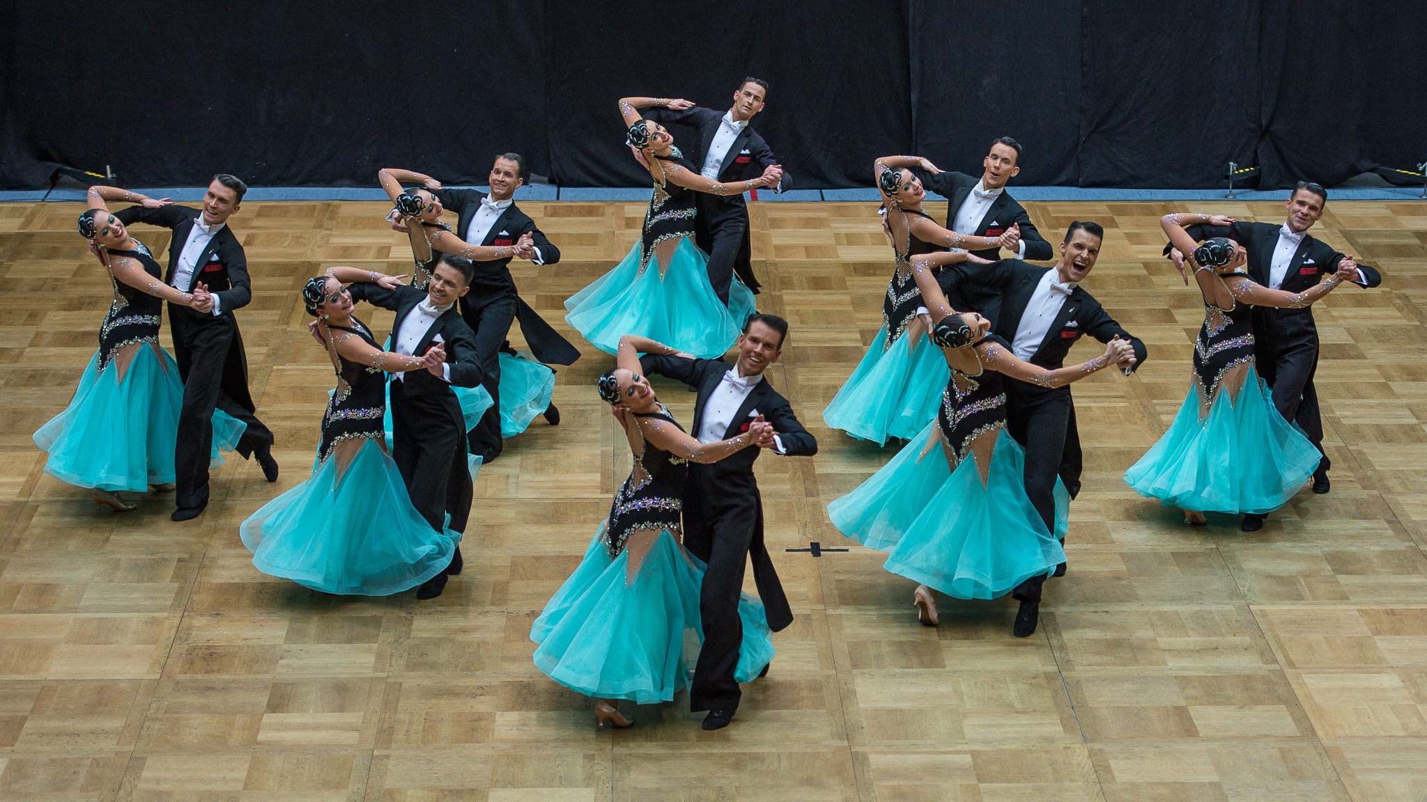 1. Bundesliga Standard Formation,Formationstanz,Sporthalle am Berliner Platz,TSC Schwarz-Gold Göttingen,Tanzsport